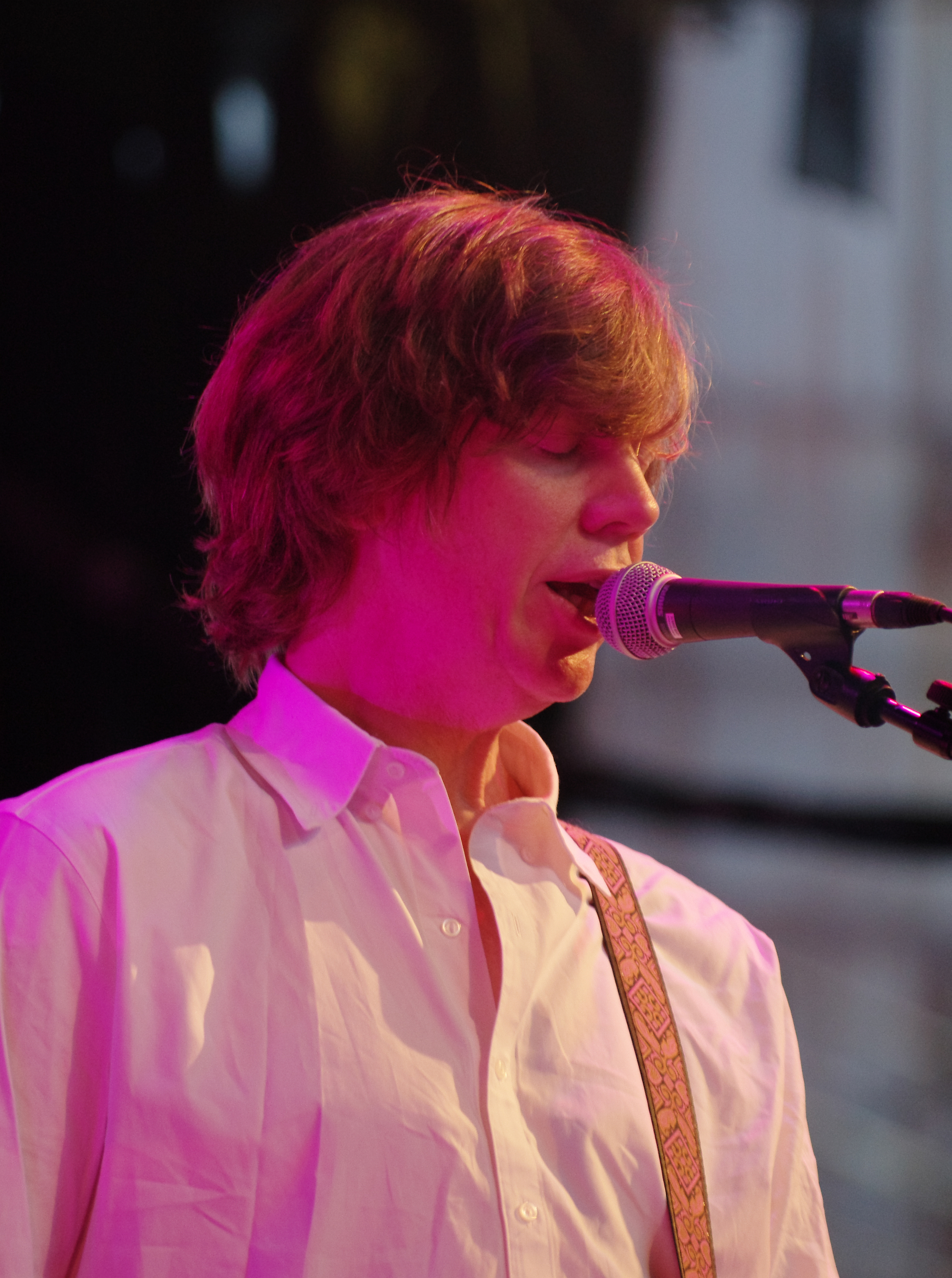 Chelsea Light Moving beim Traumzeit-Festival 2013 in Duisburg. Besetzung: Samara Lubelski (bass), John Moloney (dr), Thurston Moore (voc, git), Keith Wood (git)